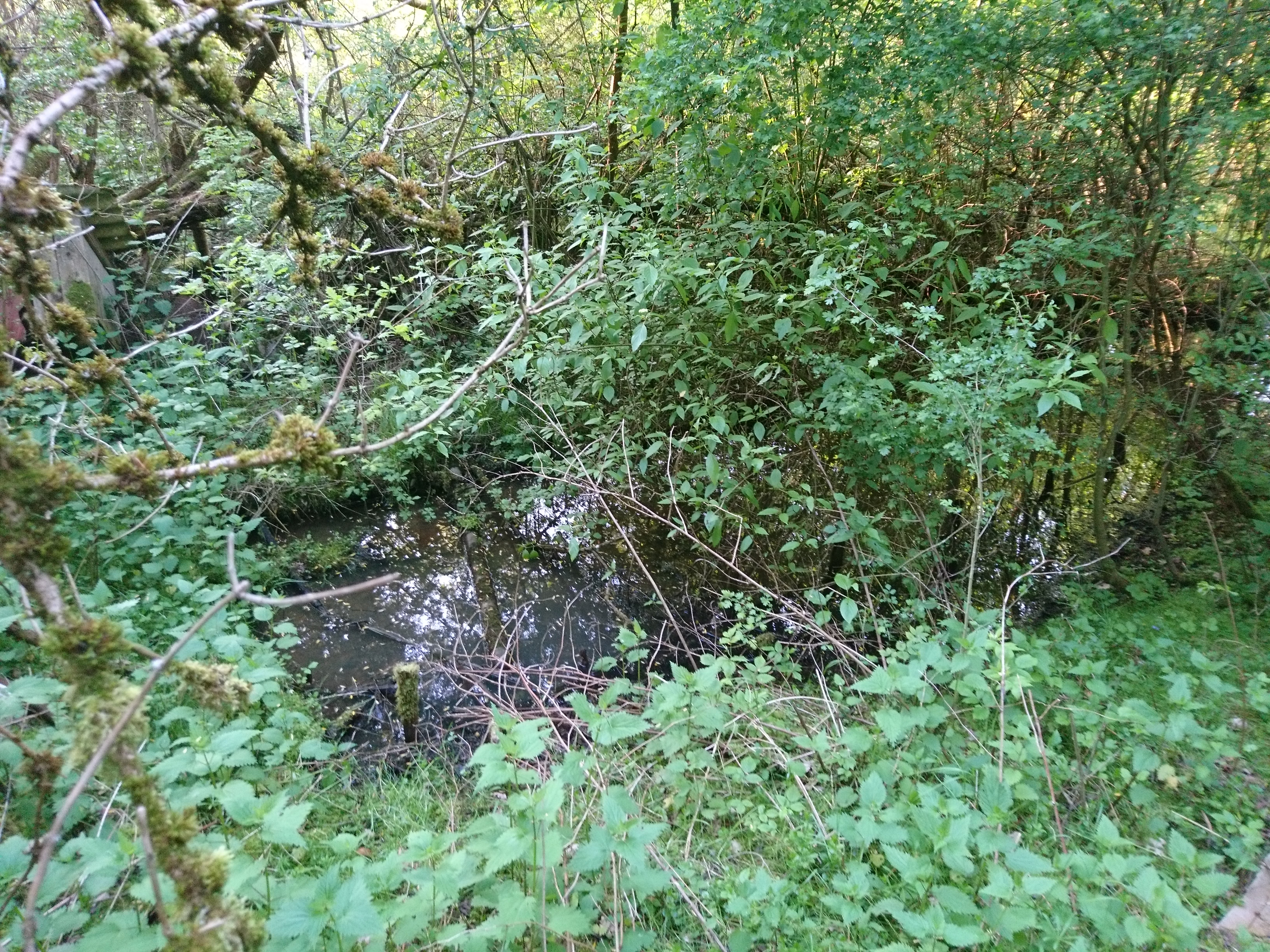 Das Bild zeigt die Quelle der Schwabach, westlich der mittelfränkischen Klosterstadt Heilsbronn.